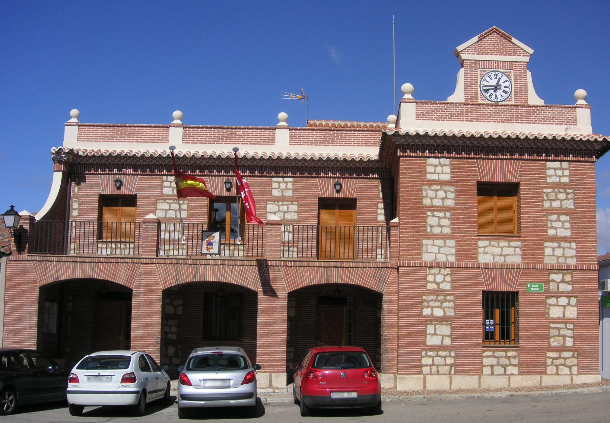 Fachada del ayuntamiento de la localidad madrileña de Valdepiélagos.